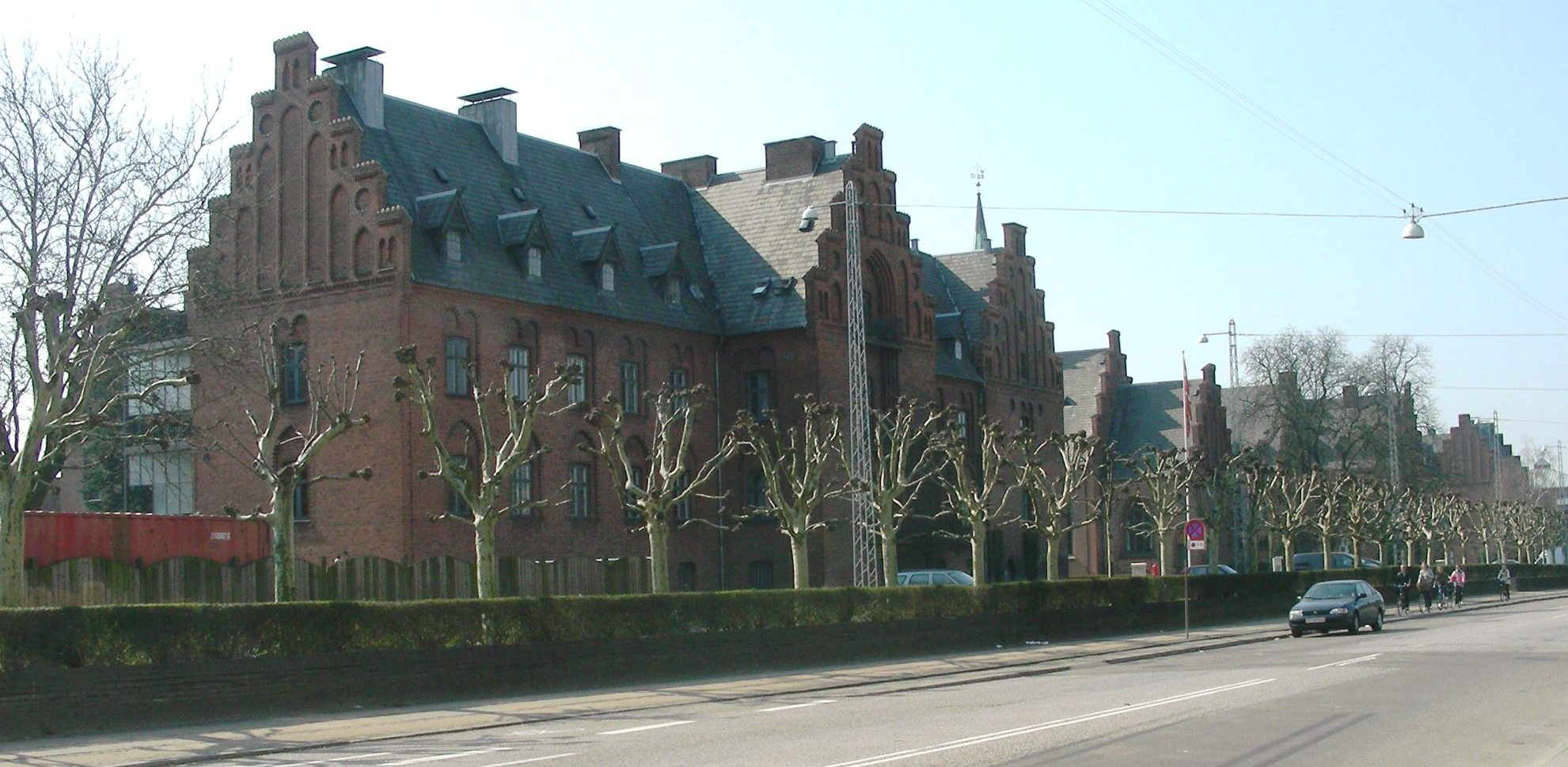 Diakonissestiftelsen, Frederiksberg, Danmark